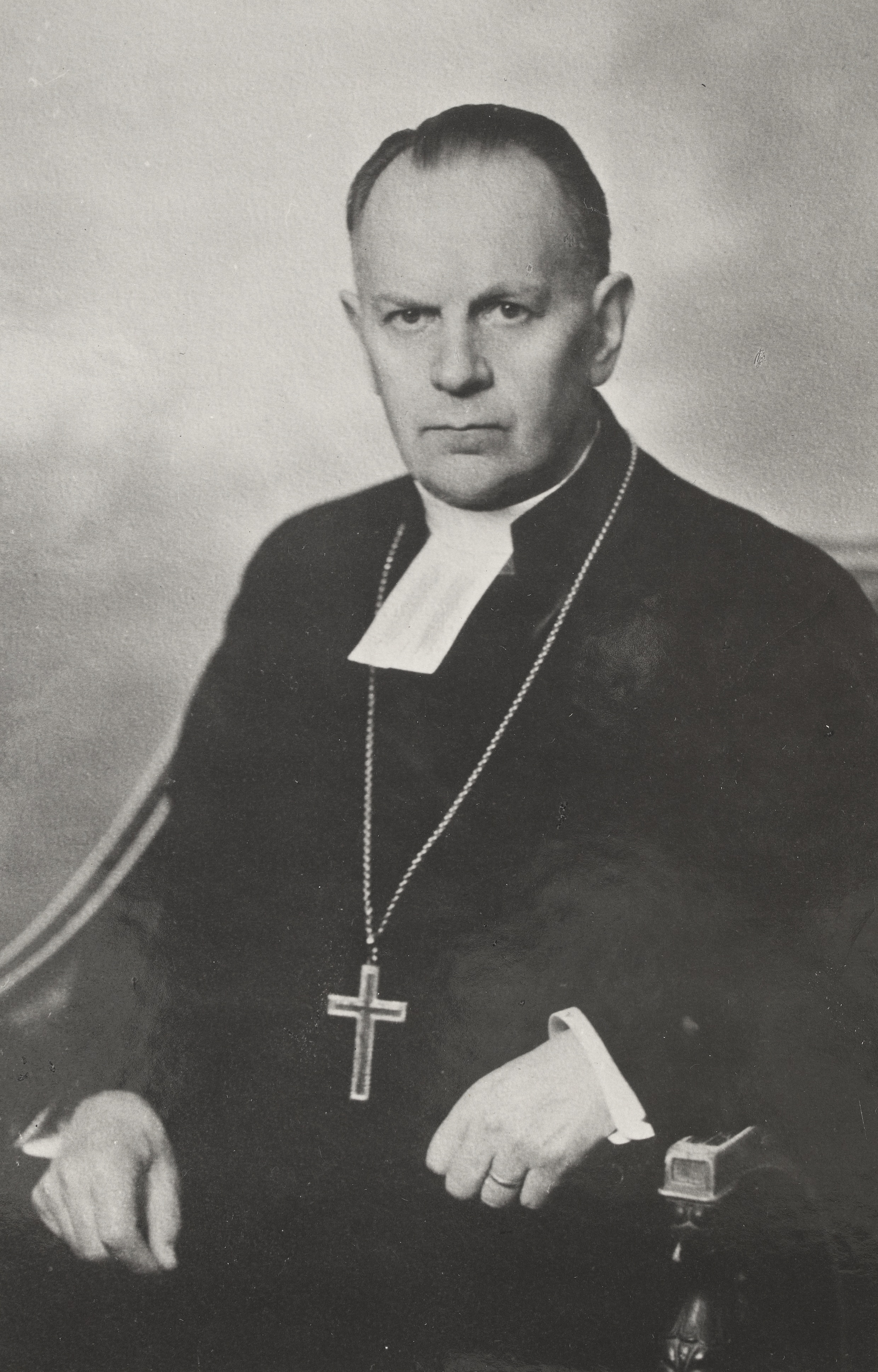 Kokoelma: Historian kuvakokoelma